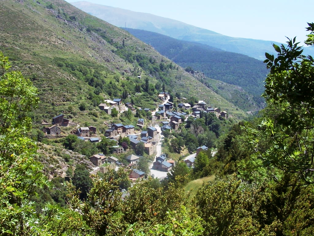 Vila de Toses, a la Vall de Ribes (Ripollès)